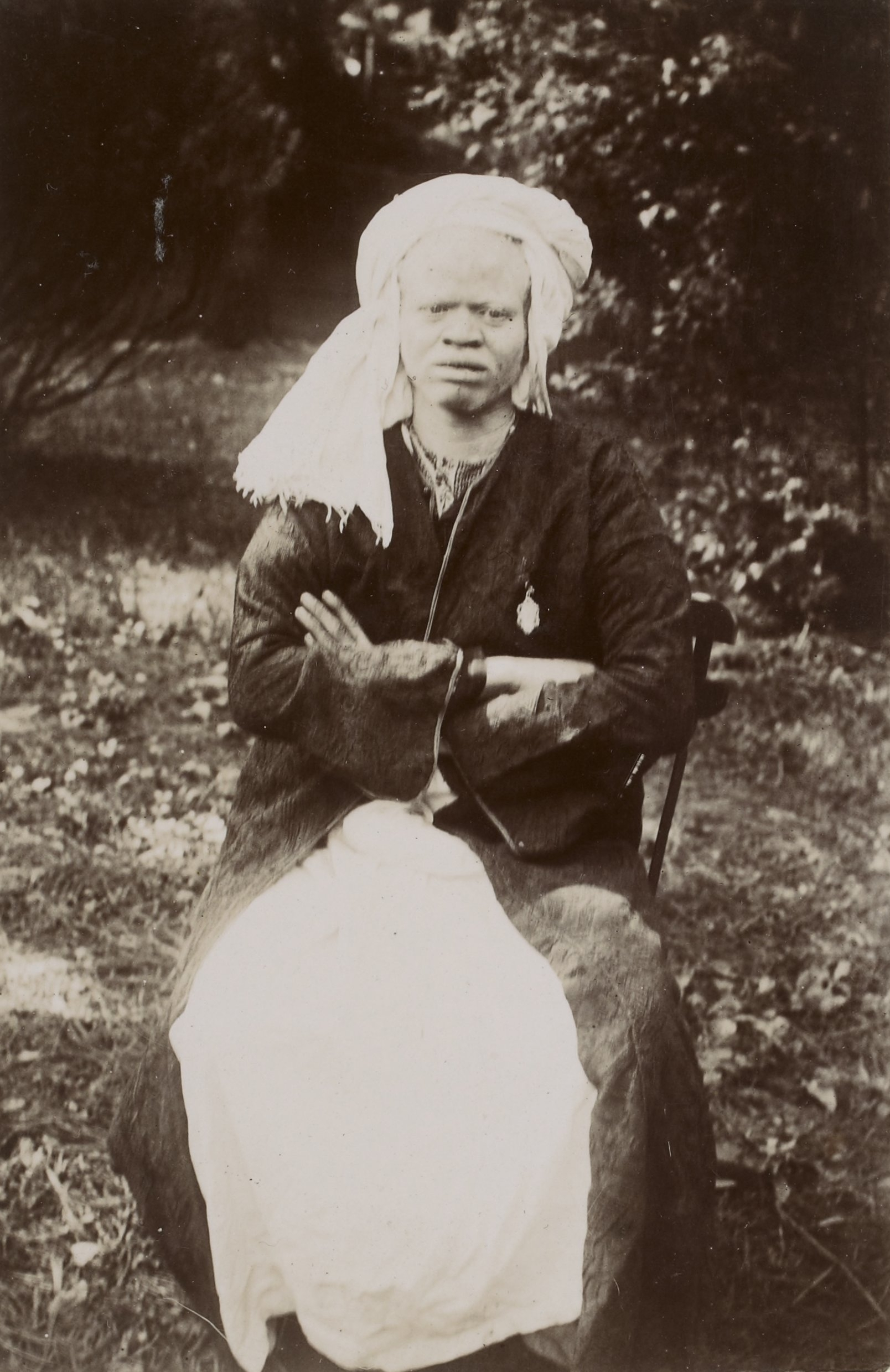 Photo d'un noir albinos du Sénégal.